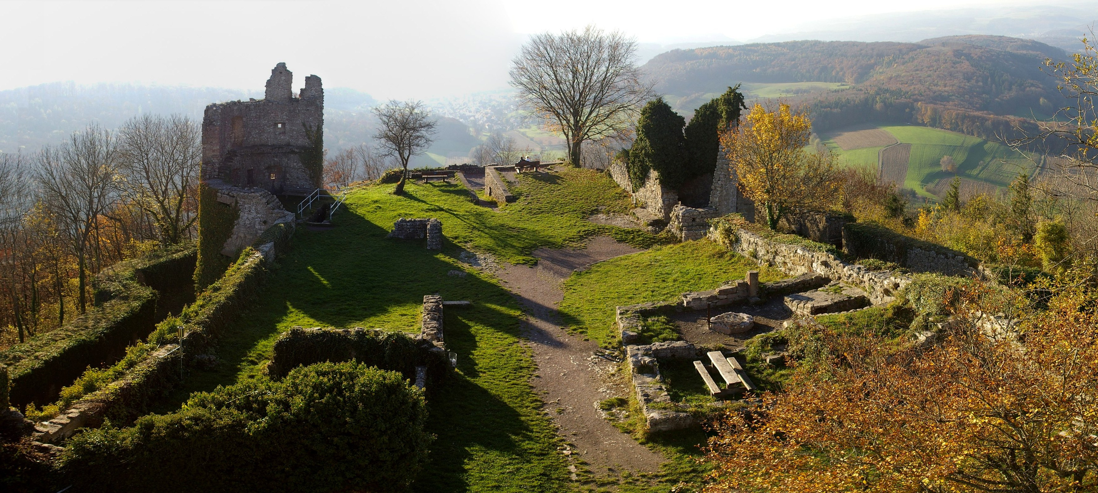 Küssaburg, Blick auf Ruine von oben